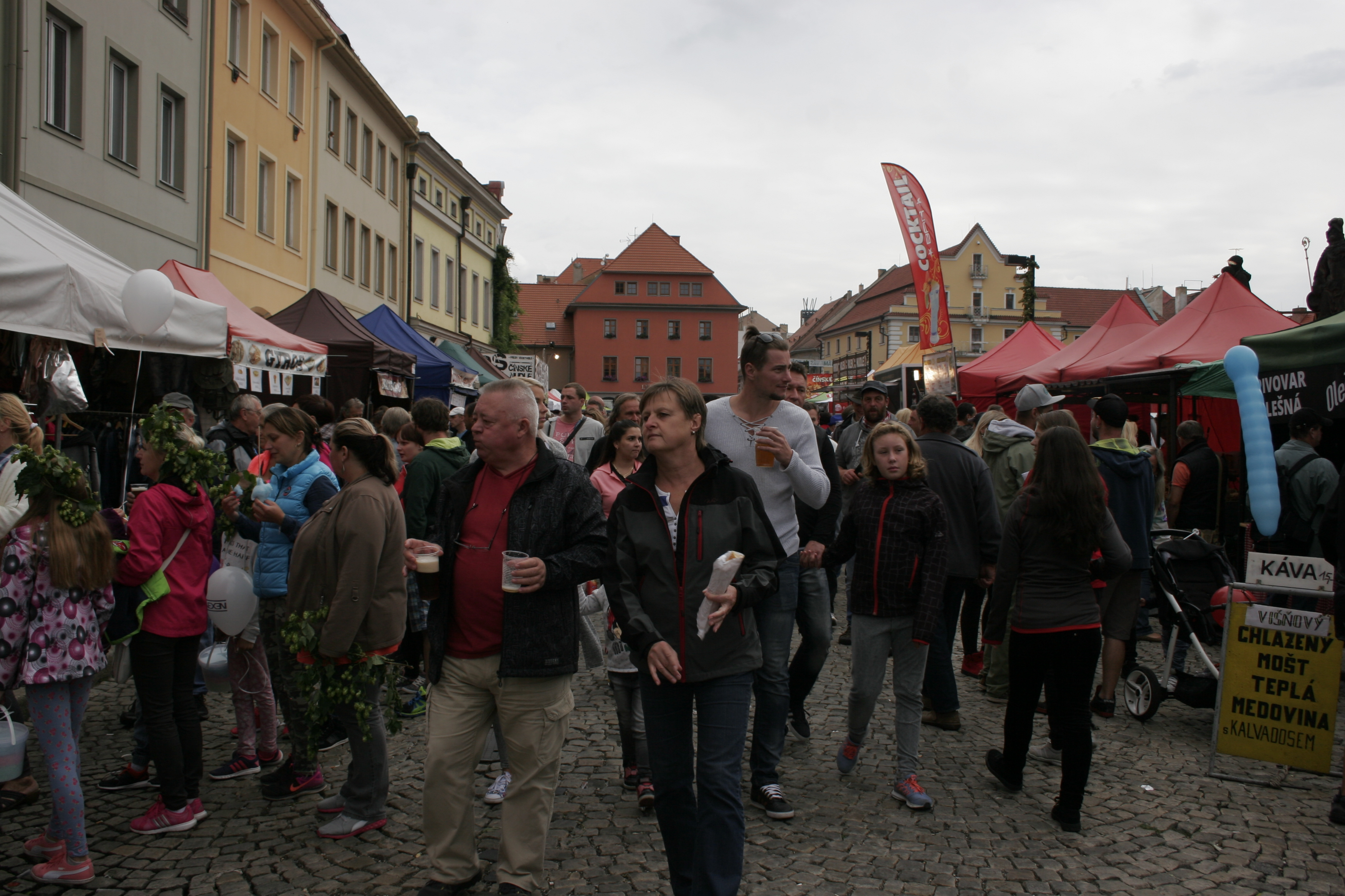 Dočená 2017. Okres Louny, Česká Republika.